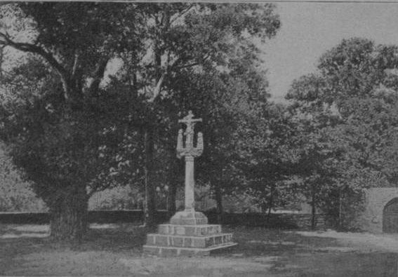 Le calvaire de Perguet vers 1899 (Journal de la jeunesse, juillet 1899, photographie de Louis Rousselet [1845-1929])